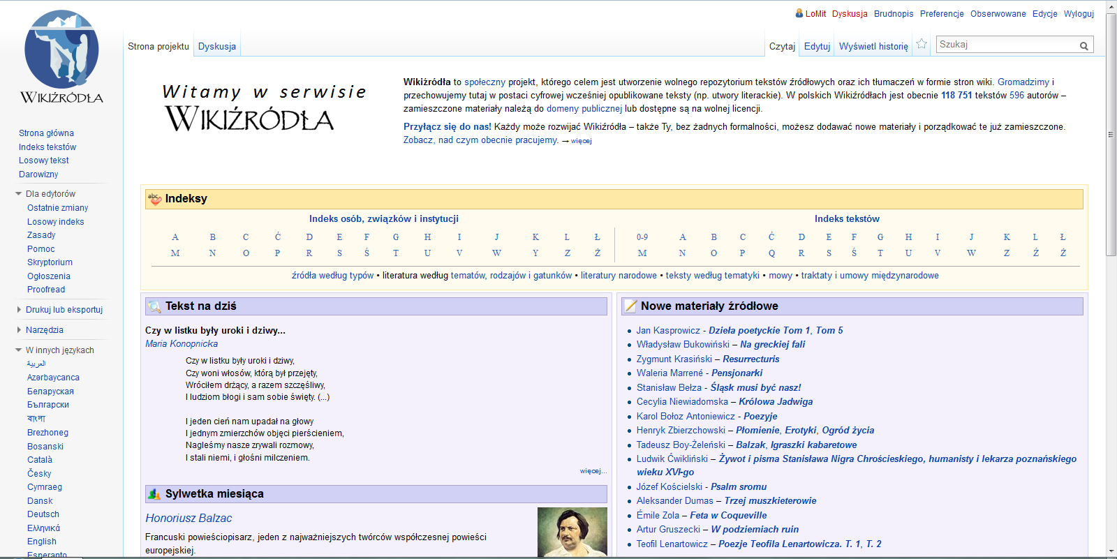 Screen ze strony Wikiźródła